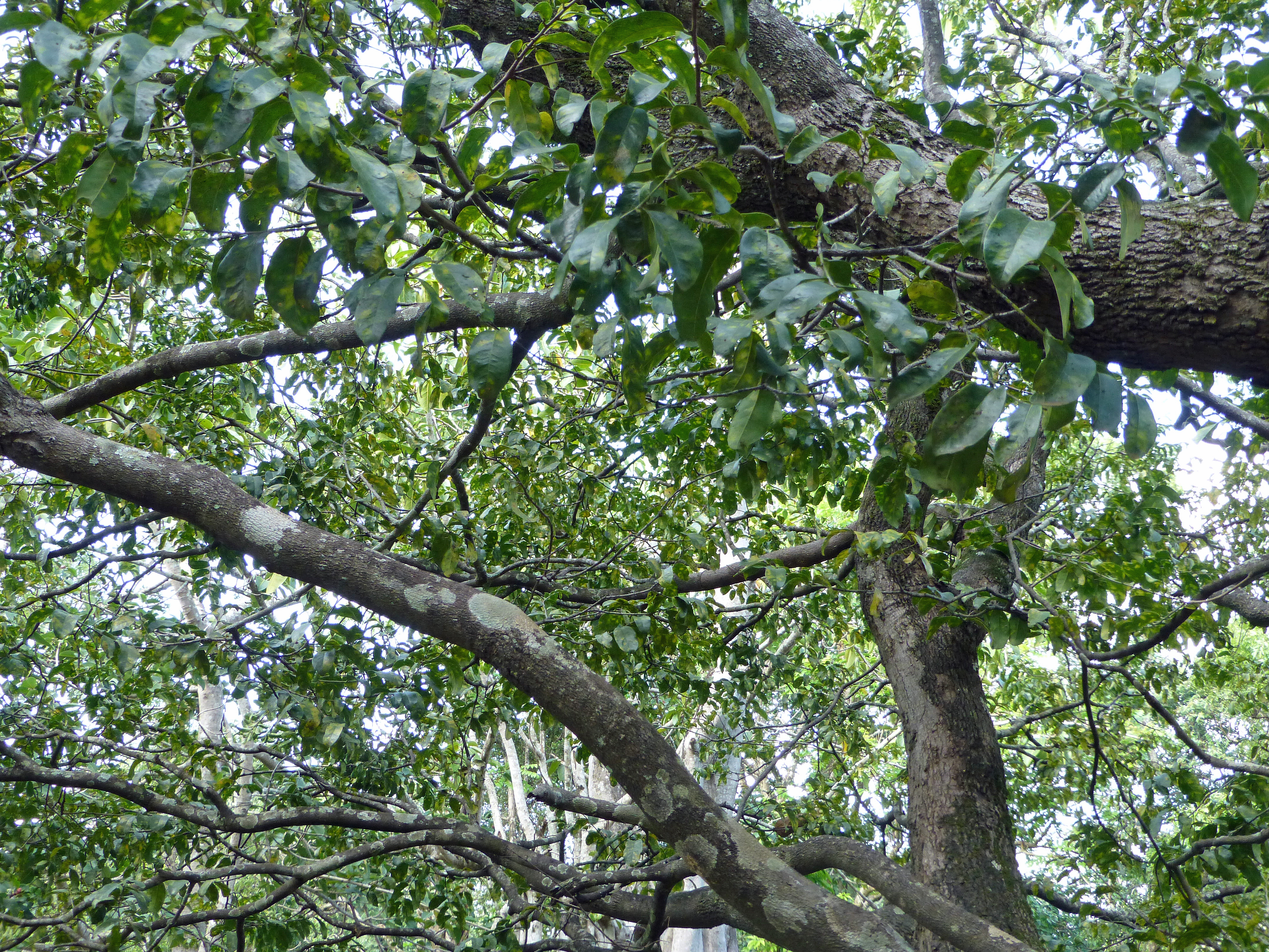 Kaluwara (Diospyros ebenum), Sigiriya Village, Sri Lanka